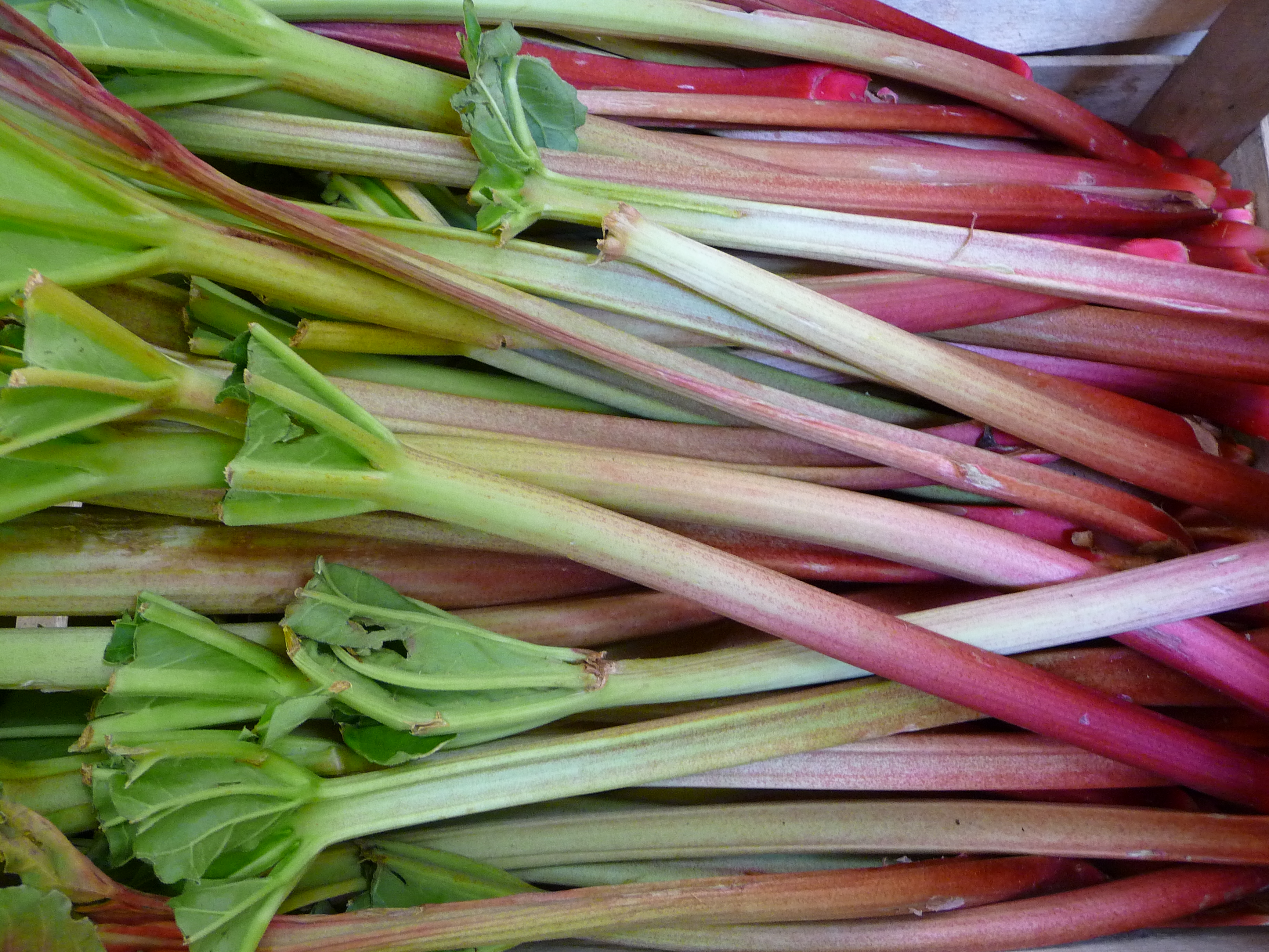 Blattstiele des Gemeinen Rhabarber (Rheum rhabarbarum)